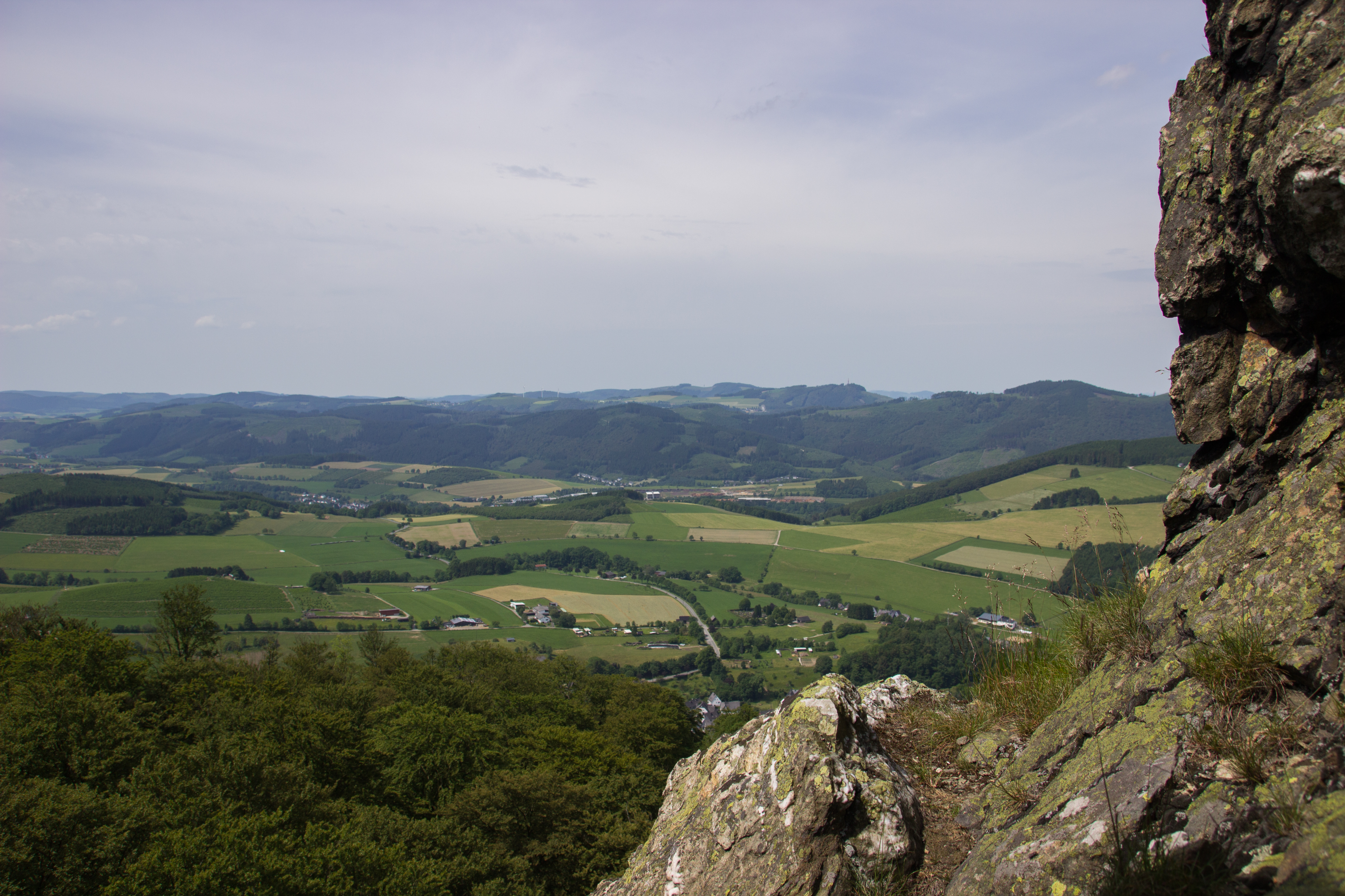 NSG „Bruchhauser Steine“ (Fels im Vordergrund),Landschaftsschutzgebiet Kultur- und Offenlandschaftskomplex Bruchhausen (Offenland Beriche) und LSG „Olsberg“ (Berge im Hintergrund) – Feldstein, Bruchhausen, Hochsauerlandkreis, Nordrhein-Westfalen, Deutschland. Vom höchsten Stein der Bruchhauser Steine, dem Feldstein, bietet sich ein fabelhafter Ausblick auf das umgebende Hochsauerland. Aufgenommen wurde diese Fotografie am frühen Mittag.